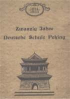 Ein Bild der Einladung zur Feier zum 20 Jaehrigen bestehen der Deutschen Schule Peking (vor der Neugruendung.) A picture of the invitation to celebrate the 20th anniversary of the German School in Beijing (before the foundation.)